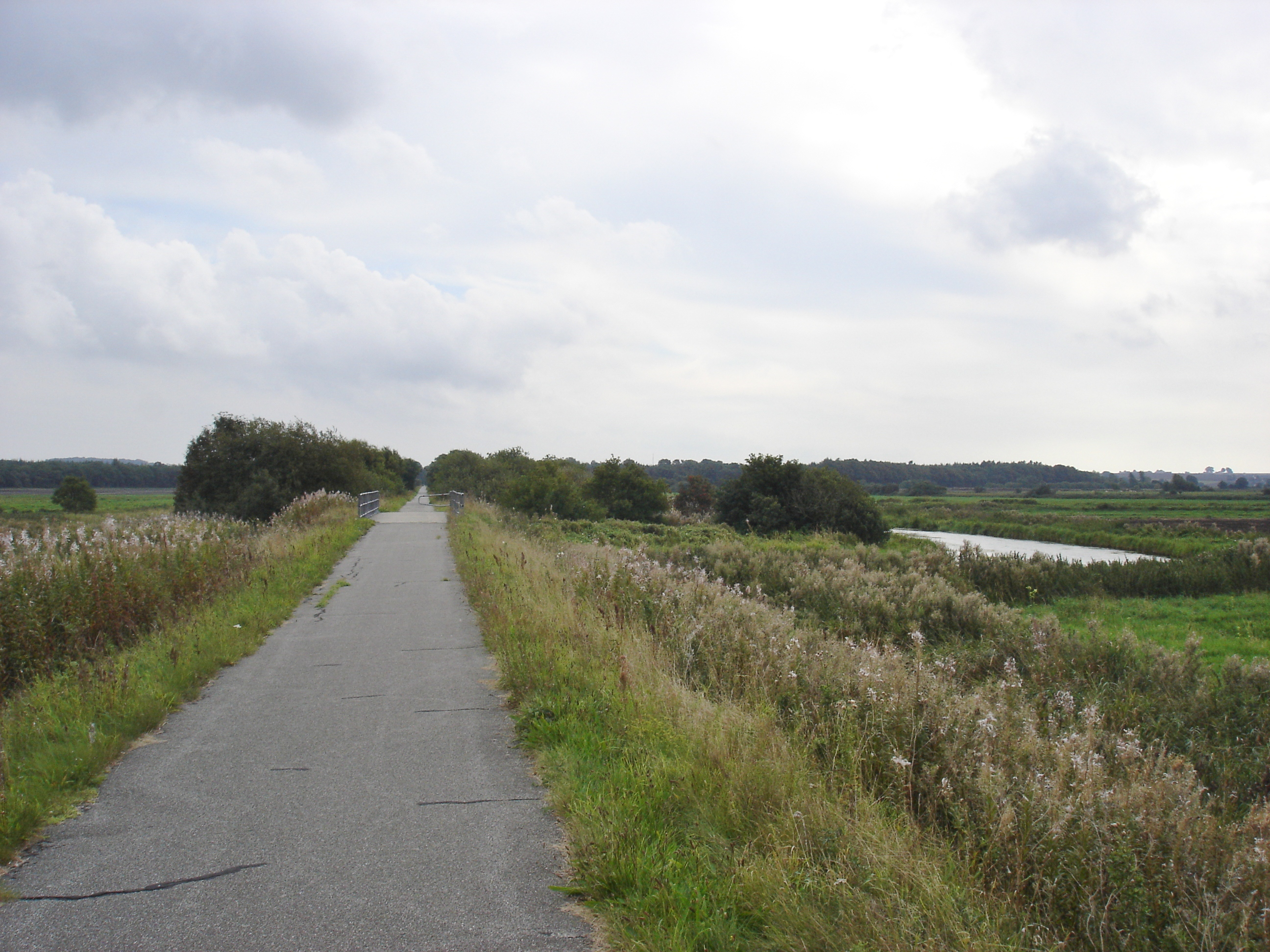 Aalborg-Hadsund-banens tracé krydser Lindenborg Å - efter broen var der en vandkran th. og et trinbræt med perron af sveller tv.